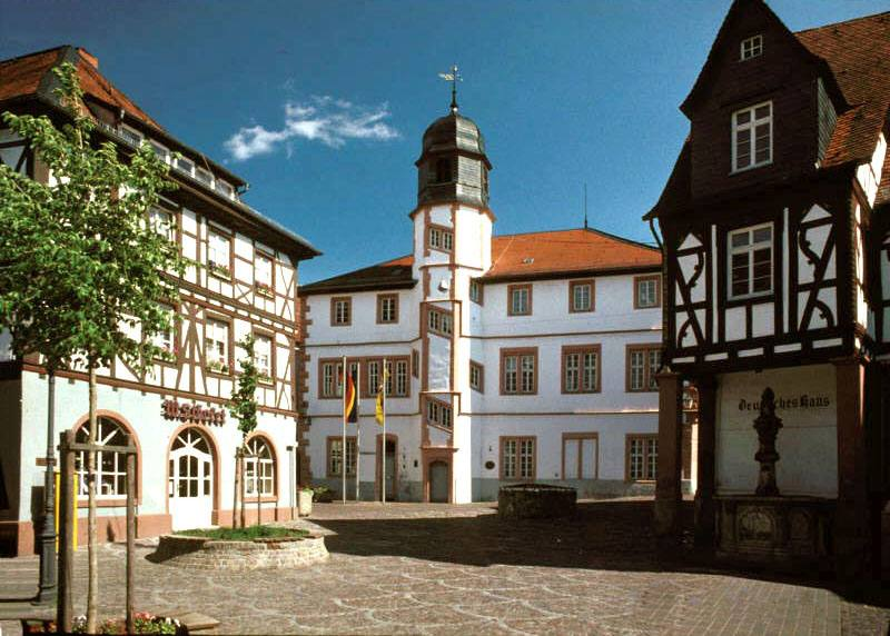 Fischmarkt mit altem Rathaus Foto: E. Tinnacher (Benutzer:Serie1, eigenes Foto)